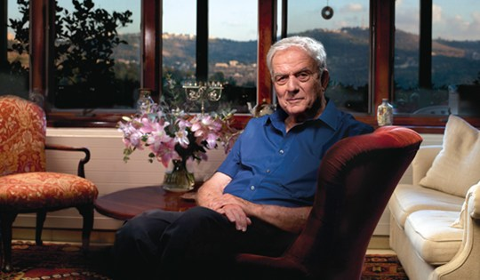 פרופסור לכלכלה מנחם יערי